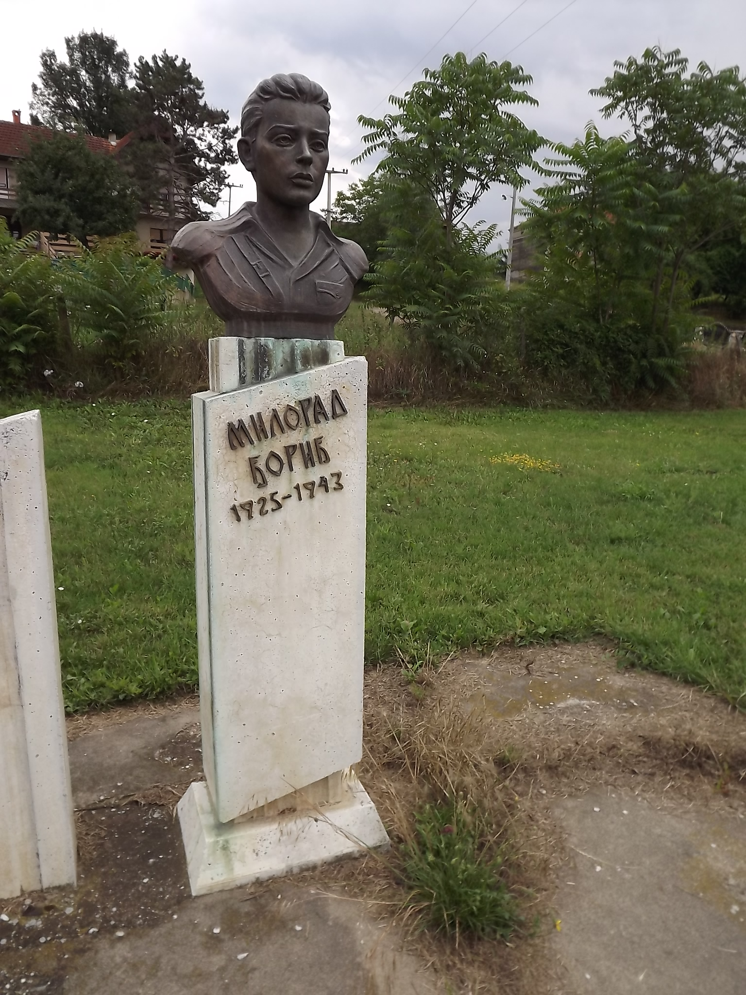 Spomenik borcima u oslobodilačkim ratovima. Fotografija nastala u okviru saradnje Narodnog univeziteta Trstenik, Narodne biblioteke Jefimija i Saveza boraca Trstenik